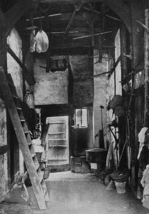 Originalbeschreibung „Durchgangsdiele. Lippisches Zieglerhaus in Heidelbeck“. – Kalletal, Nordrhein-Westfalen, Deutschland.